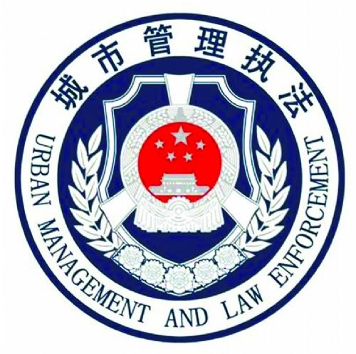 中文（中国大陆）: 城市管理执法标识